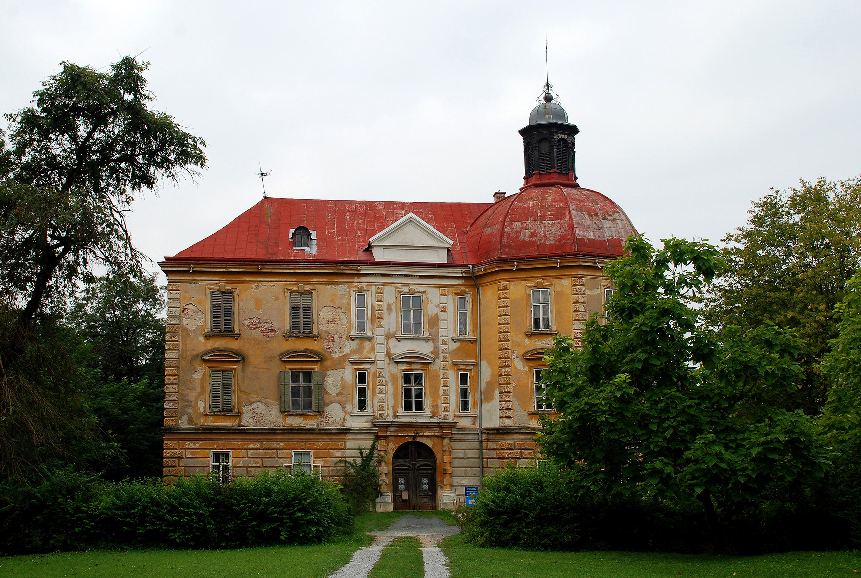 Schloss Hornegg bei Preding in der Steiermark, Österreich